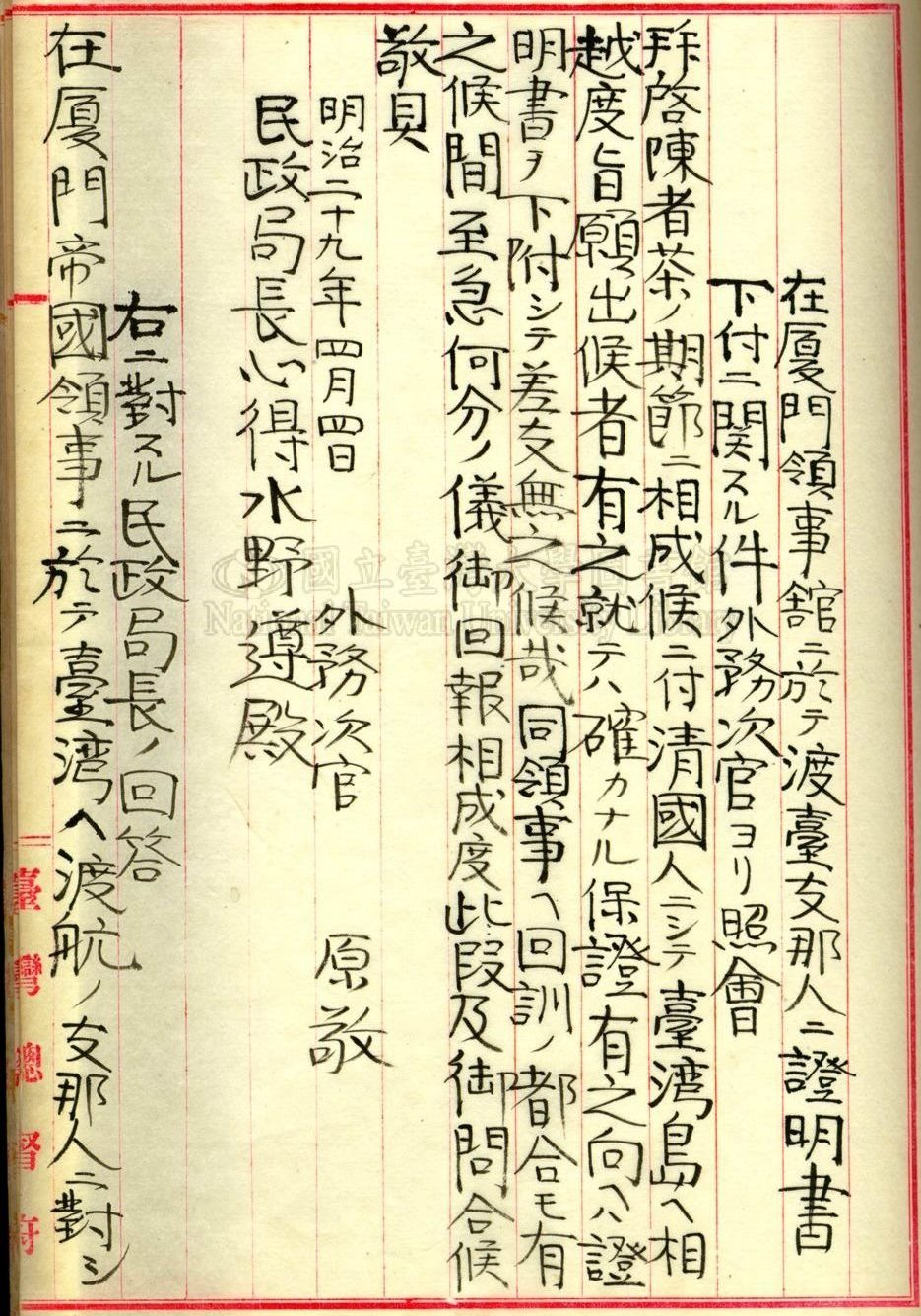 明治29年4月4曰: 在廈門領事館ニ於テ渡臺支那人ニ證明書下付ニ關スル件外務次官ヨリ照會